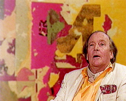 Portrait de l'artiste Arthur Aesbacher